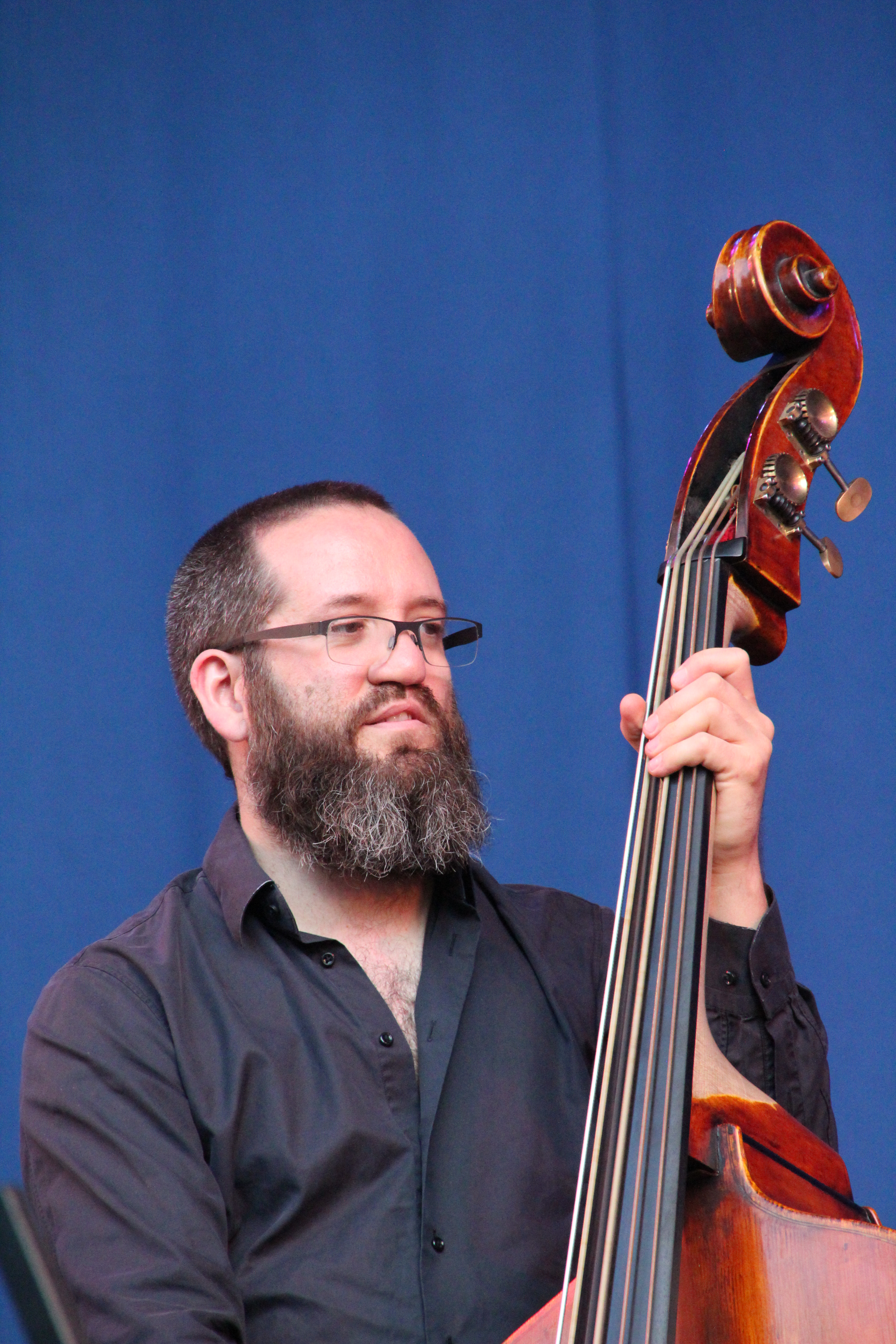 Bildinhalt: Robert Landfermann bei einem Auftritt mit dem European Blue Note Quartet im Frankfurter Palmengarten Aufnahmeort: Frankfurt am Main, Deutschland Die dargestellte Person wurde bei einem öffentlichen Auftritt fotografiert.